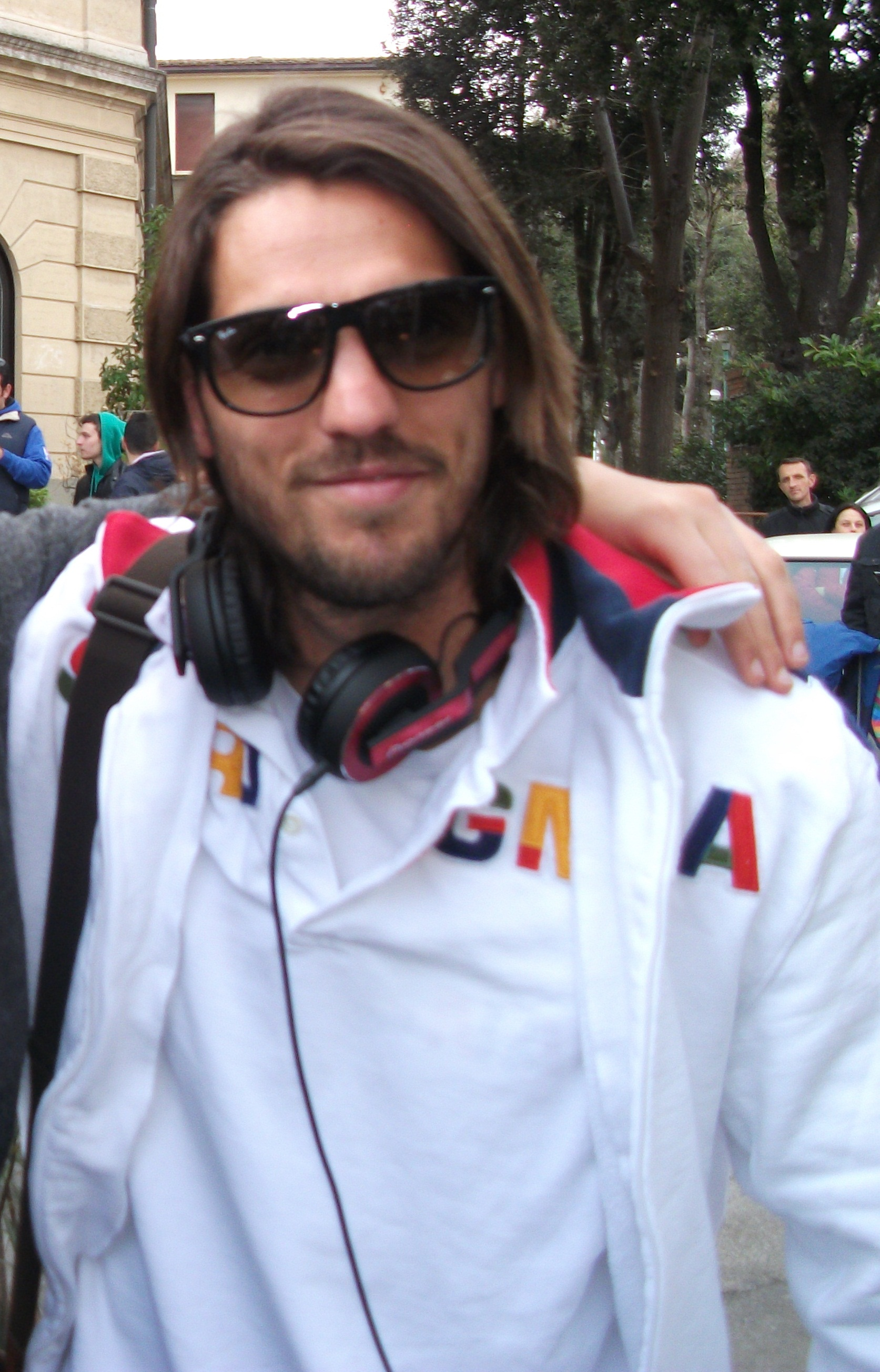 Joaquín Larrivey prima della partita di Serie A, Siena - Cagliari del 4 marzo 2012.